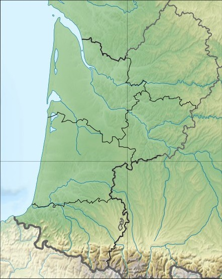 Carte Region Aquitaine relief